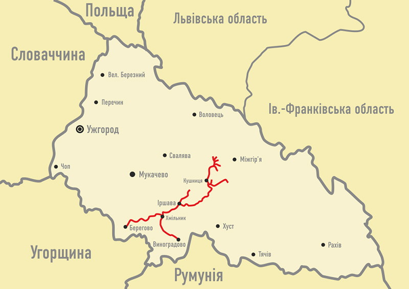 Боржавська вузькоколійка - схема